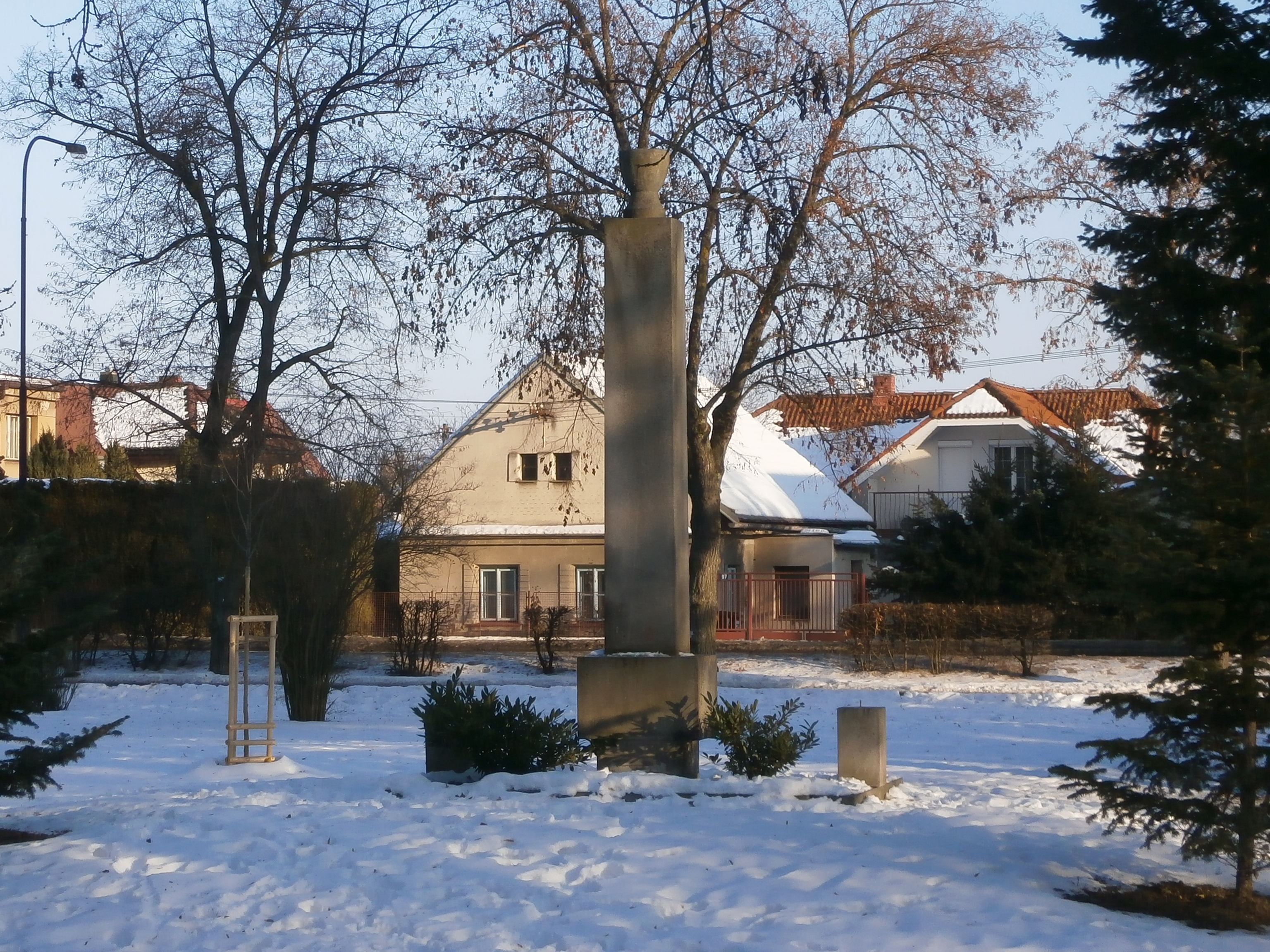 Pomník M. J. Husa na Pouchově (Hradec Králové)